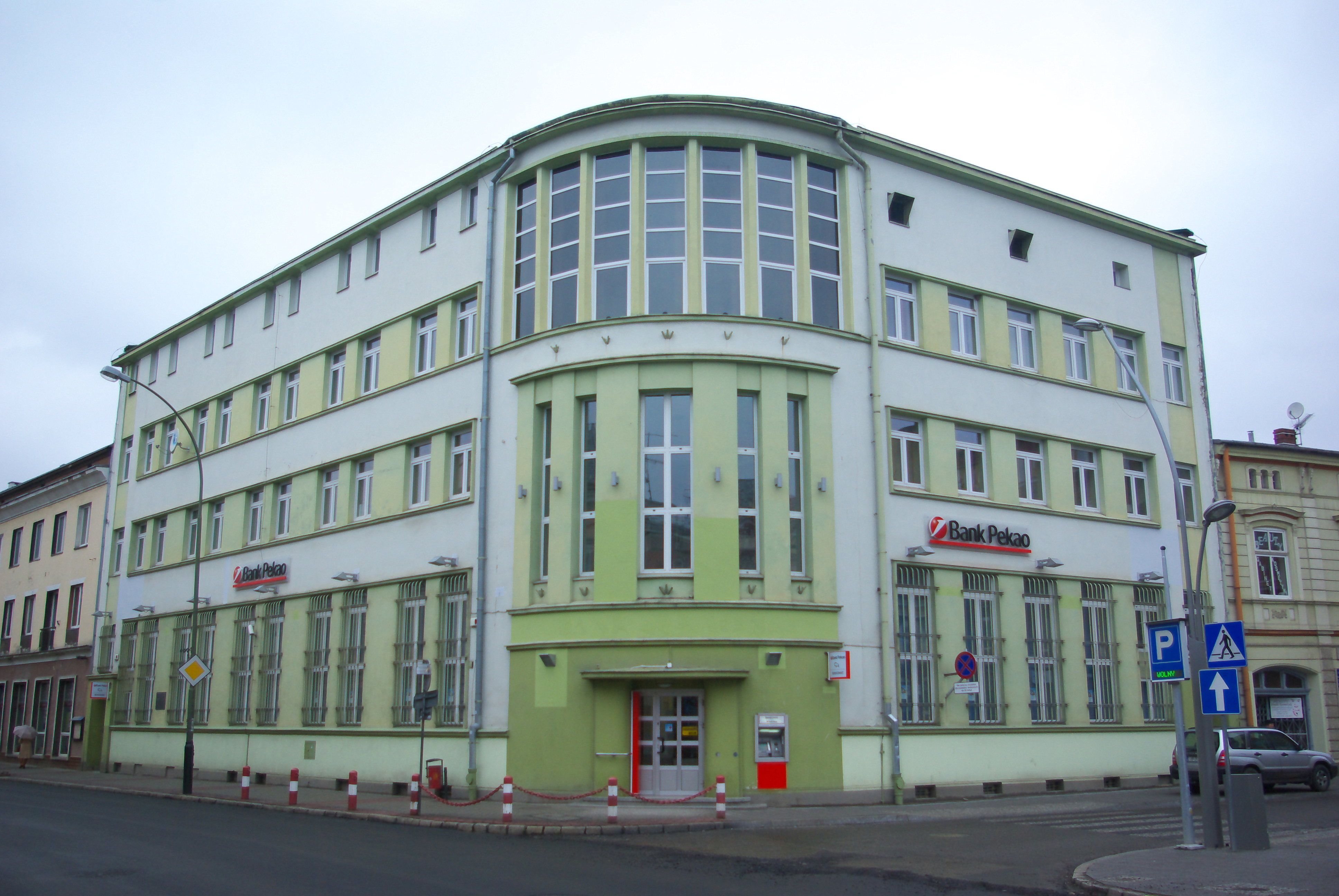 Budynek przy ul. Kościuszki 4 w Sanoku, stan w 2013